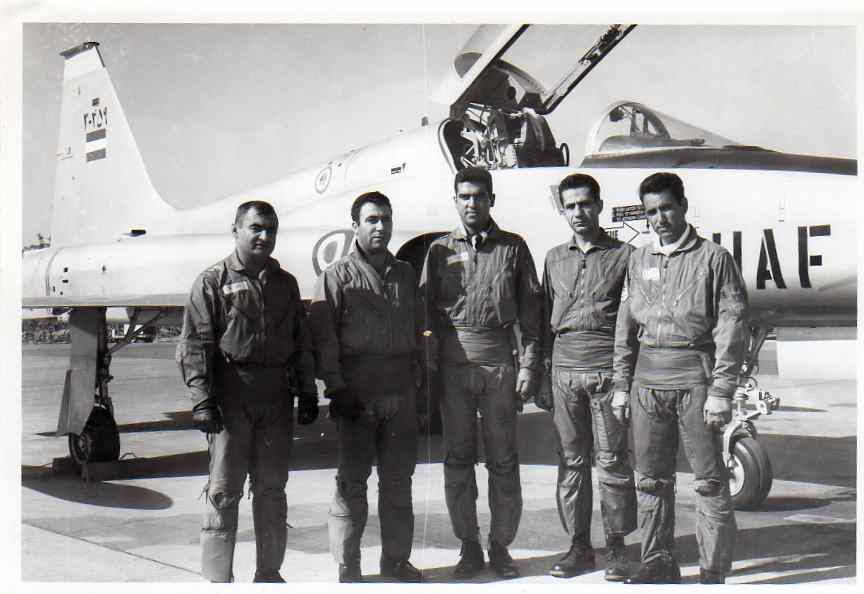 تیم آکروجت تاج طلایی از راست: ربیعی، کیمیاگر، عبداللهی فرد،یوسفی، ایمانیان